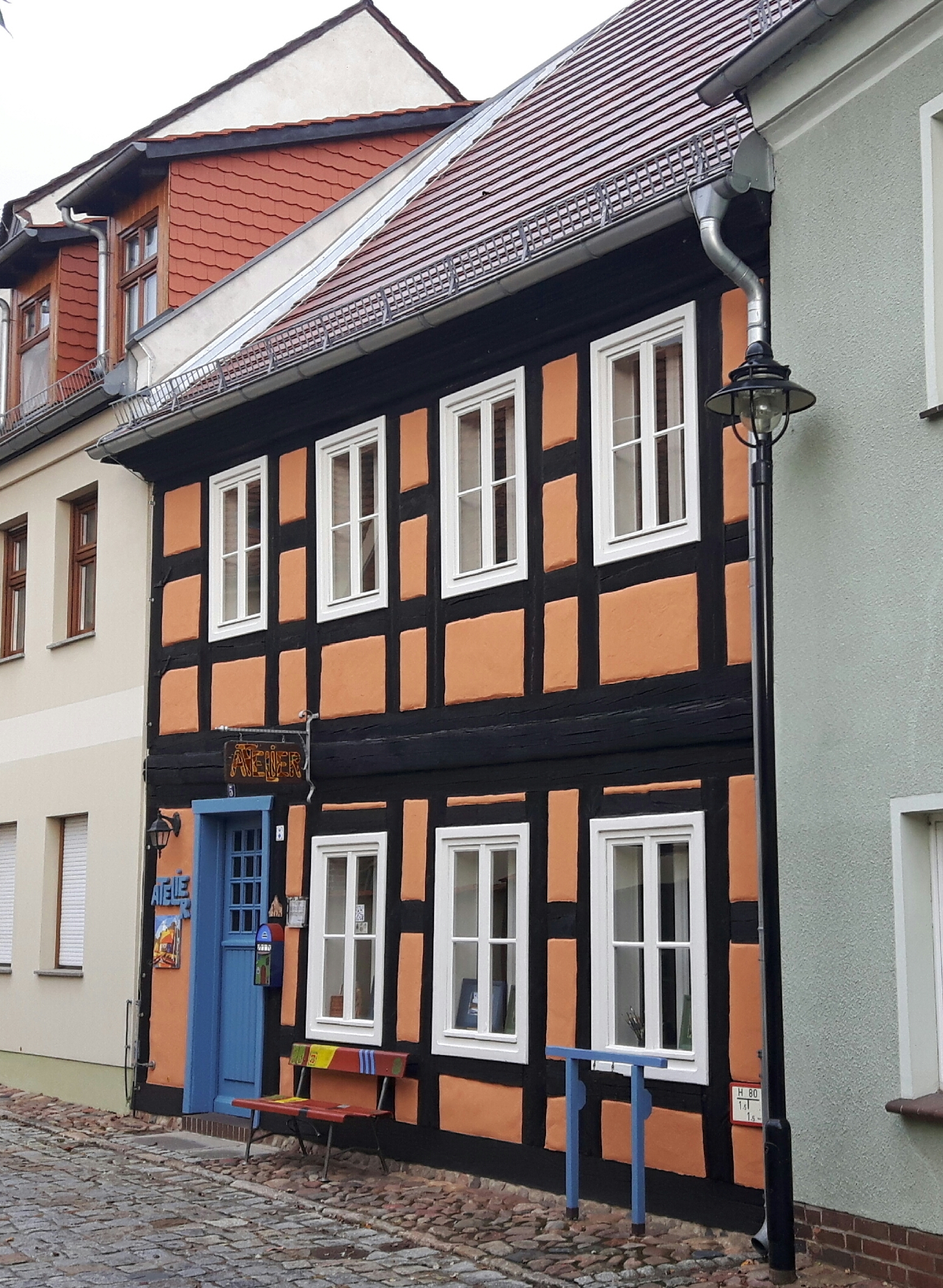 Das unter Denkmalschutz stehende Gebäude Fischerstraße 5 in Lübbenau/Spreewald, Brandenburg, im Oktober 2018.